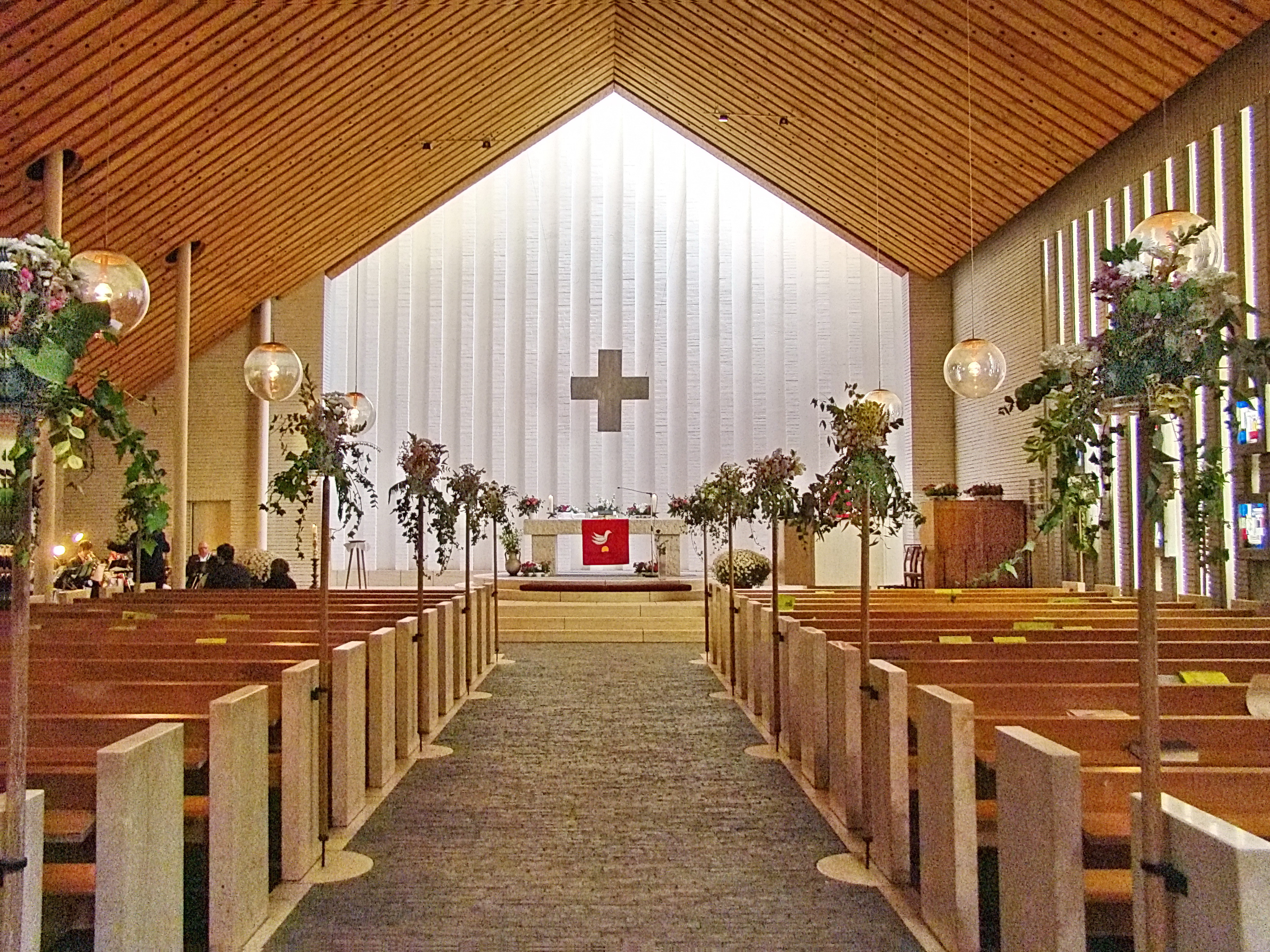 Ev.-luth. Kirche St. Magni in Bremen-Nord von Architekt Eberhard Gildemeister, erbaut 1967.Blick auf den Altar. Das abgebildete Objekt ist ein geschütztes Kulturdenkmal in der Freien Hansestadt Bremen, mit der Nr. 1702 beim Landesamt für Denkmalpflege registriert.